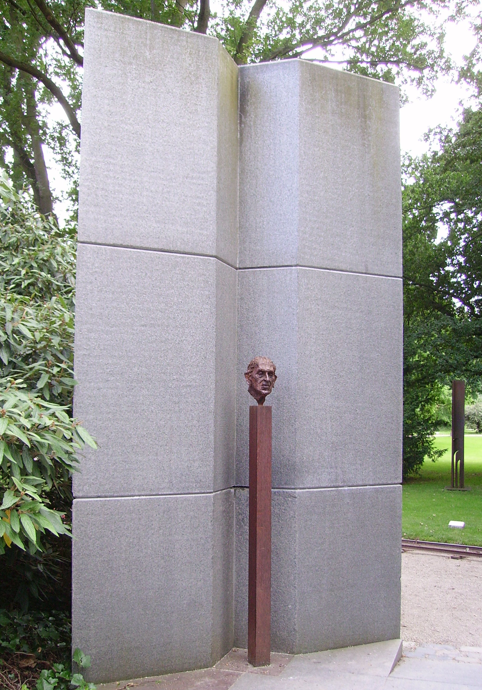 Heinrich-Vetter-Büste von Karlheinz Oswald. Luisenpark in Mannheim, Germany